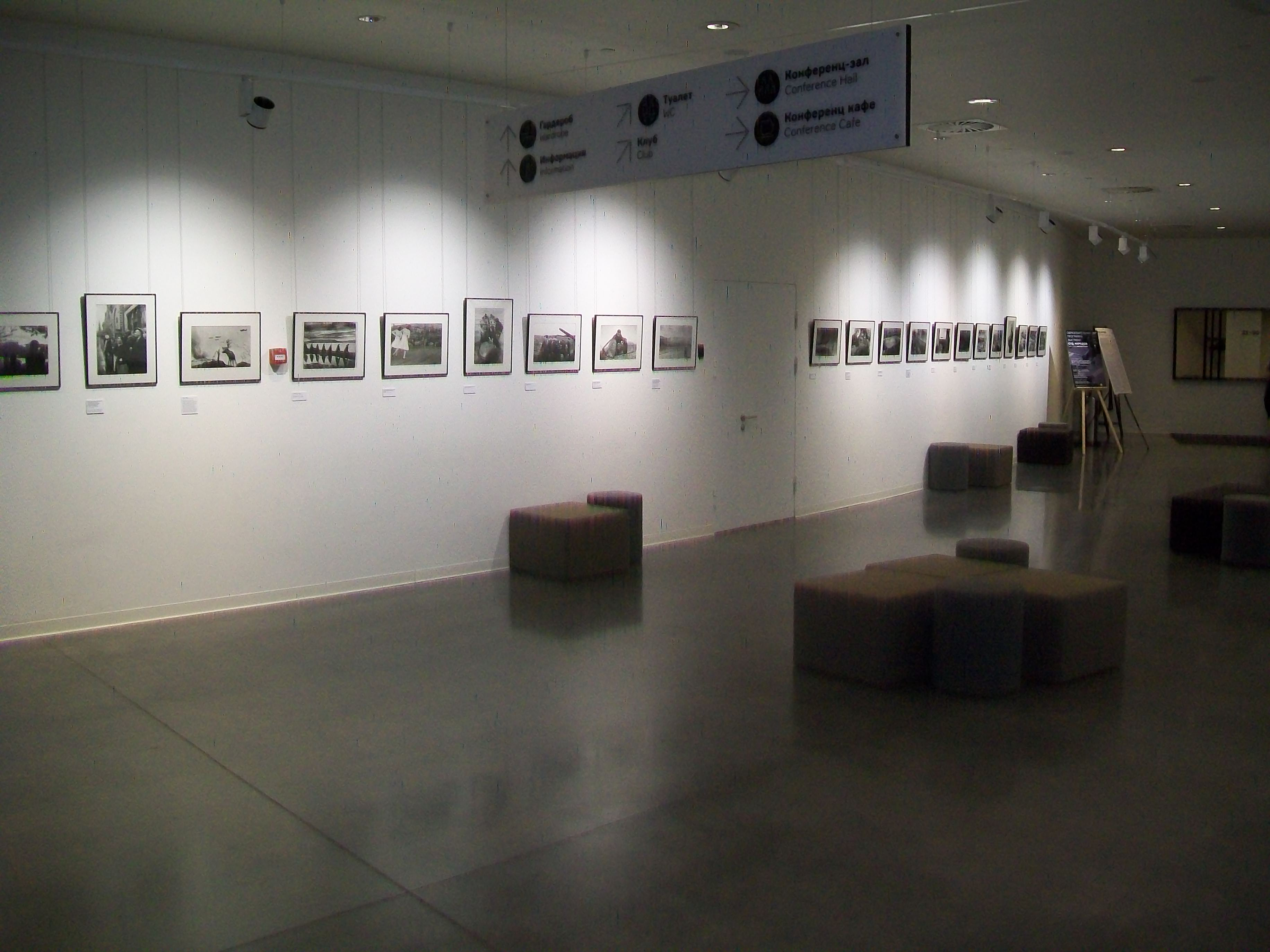 Выставка фотографий Халдея, возвращенных его дочерью из США в Ельцин-центре. 23 октября 2017 года